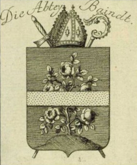 Die Abtey Baindt, Kupferstich von Reilly, 1789, etwa 7,5 x 6,5 cm